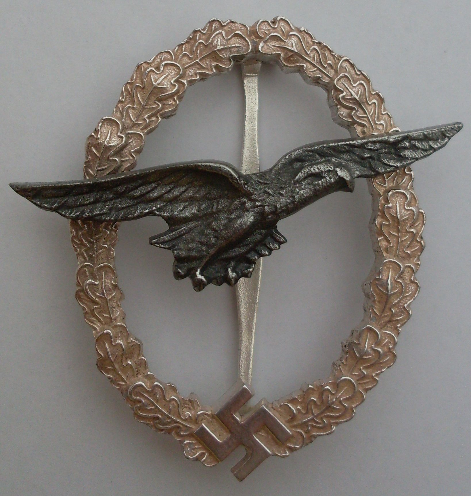 Segelflugzeugführerabzeichen